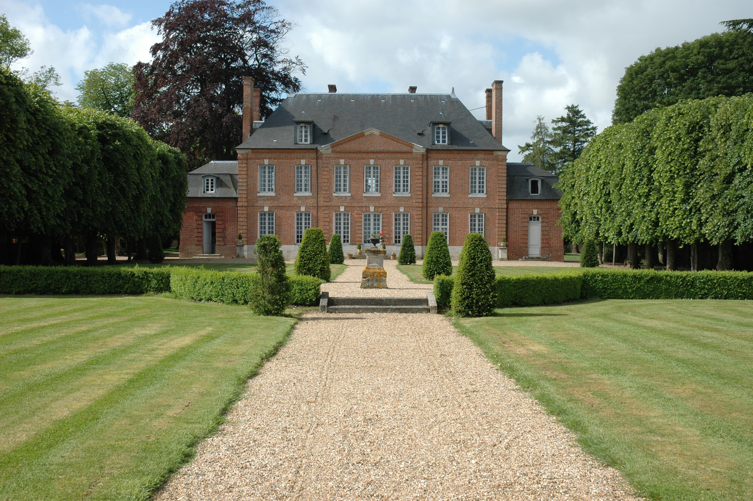 Château d'Emalleville